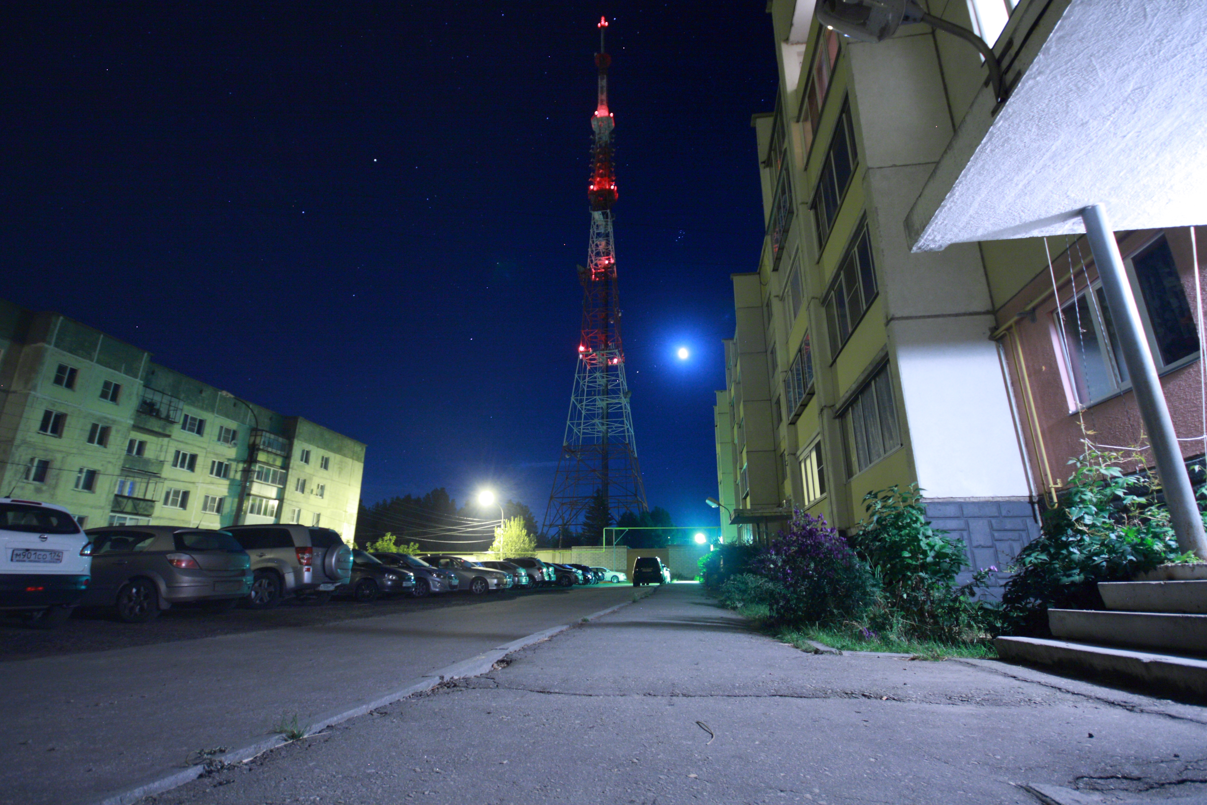 Кыштымская телебашня